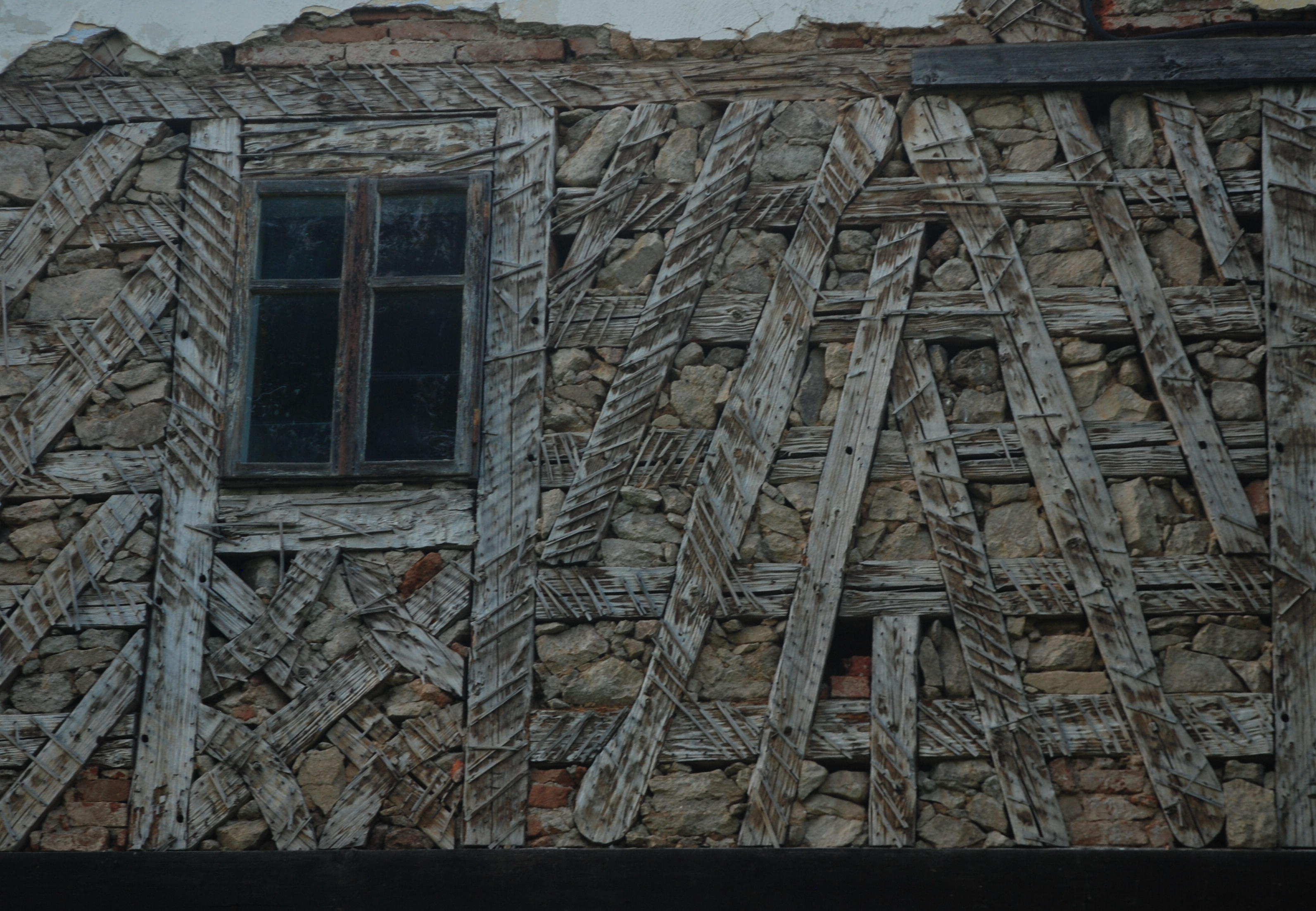 Neblažov